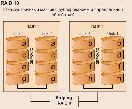 Схема архитектуры массива RAID 10